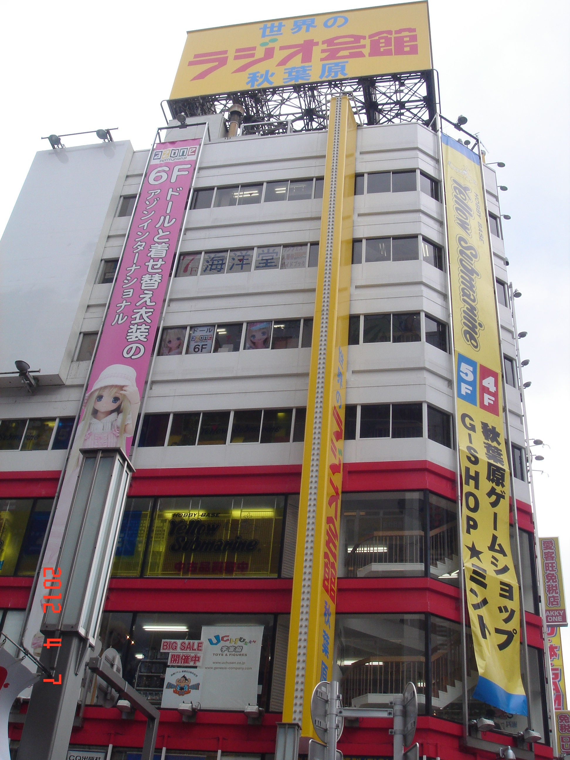 石丸電気パソコン館跡地に設置する秋葉原ラジオ会館1号館。本ビルが改装の間、2014年春ごろまで入居する。